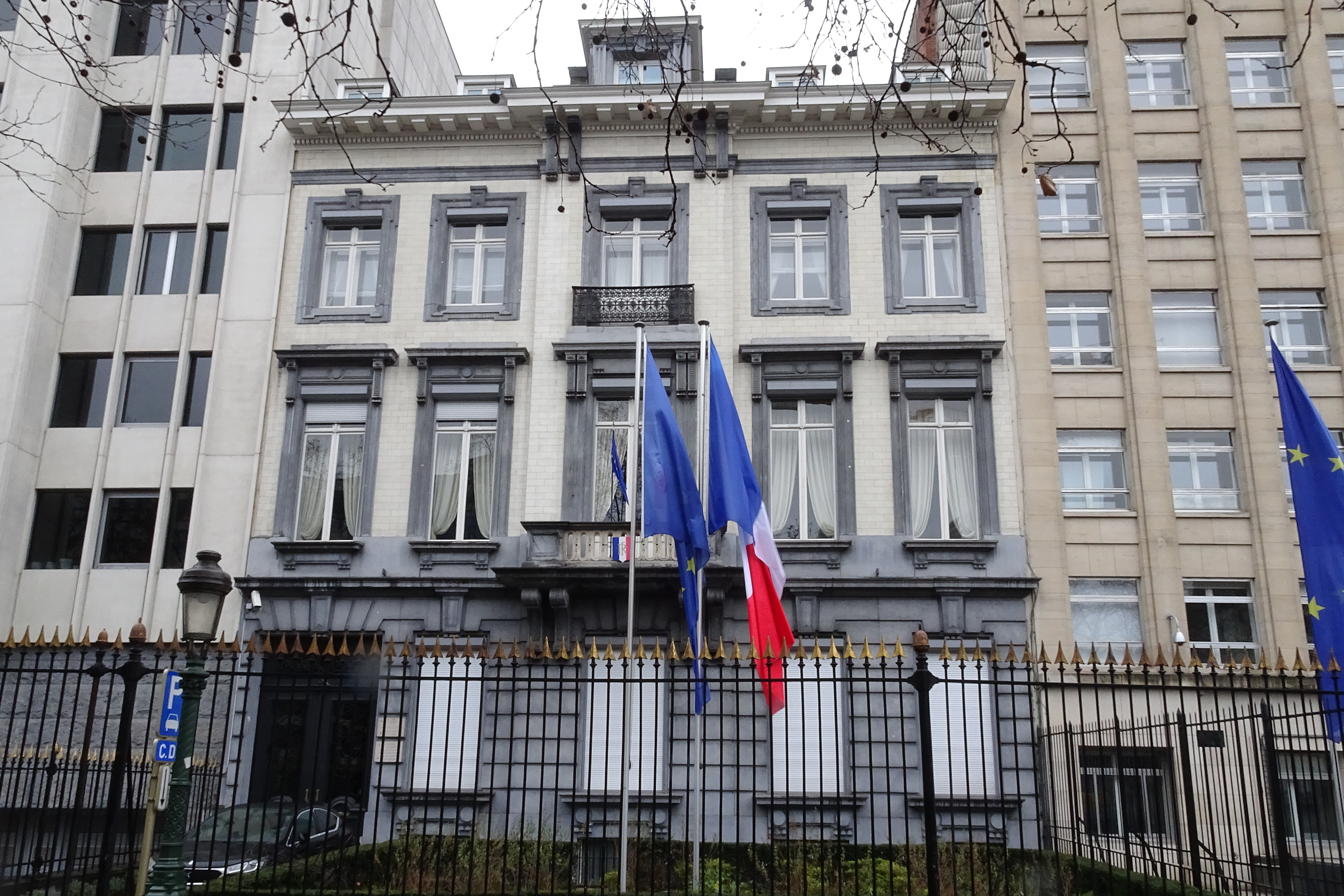 Consulat Français à Bruxelles, Boulevard du Régent 41.